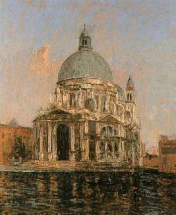 Chiesa della Salute a Venezia, olio su tavola, 74 x 61 cm., firmato